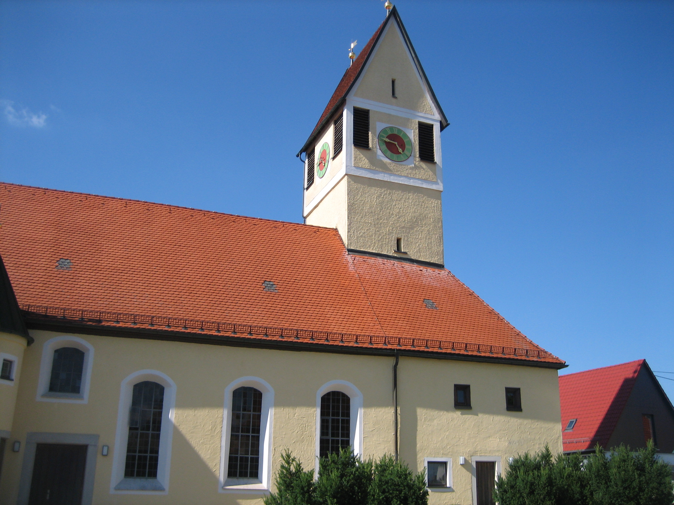 Peter-und Paulskirche Sontheim-Heroldstatt